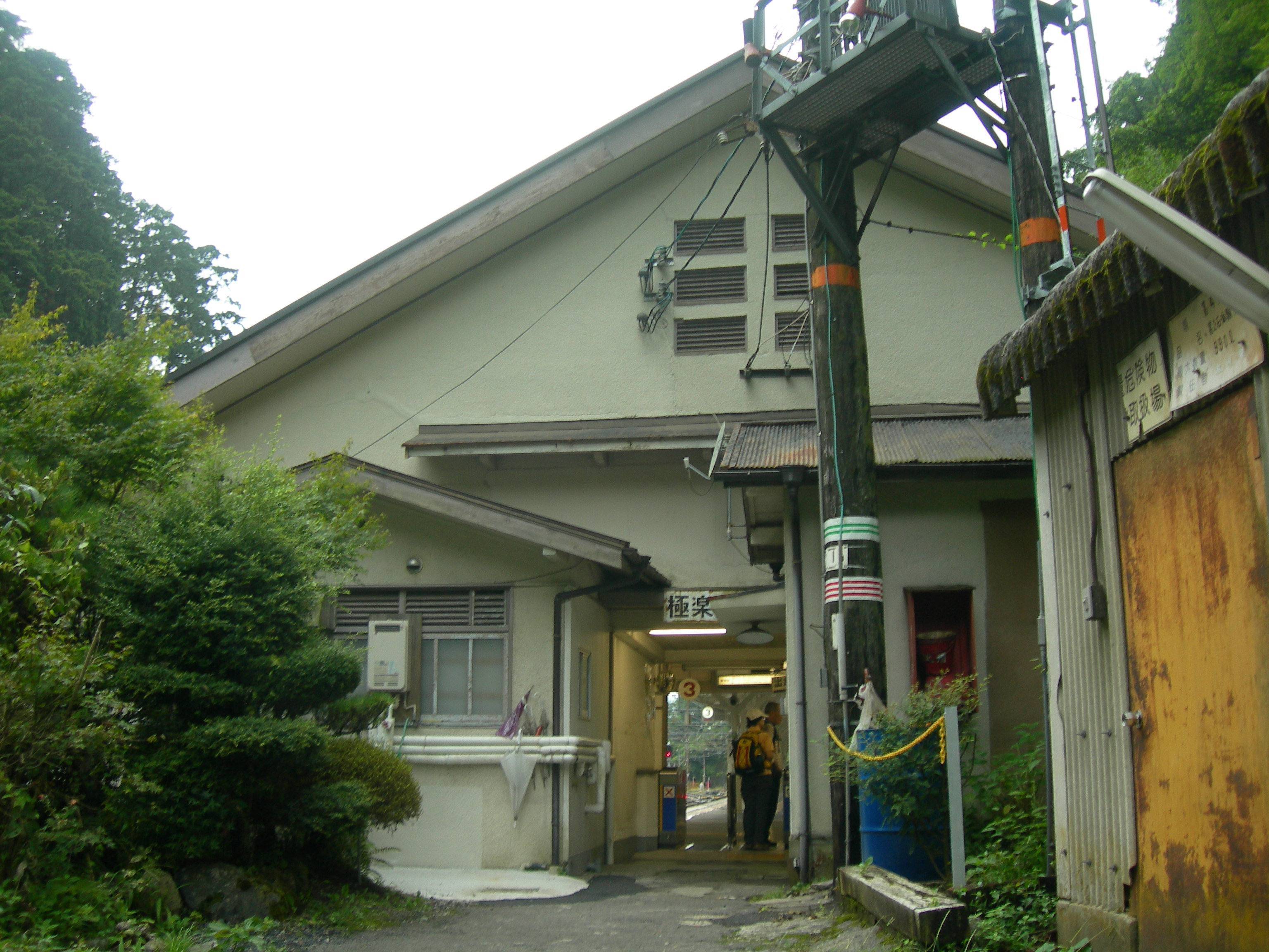 極楽橋駅 (和歌山県)